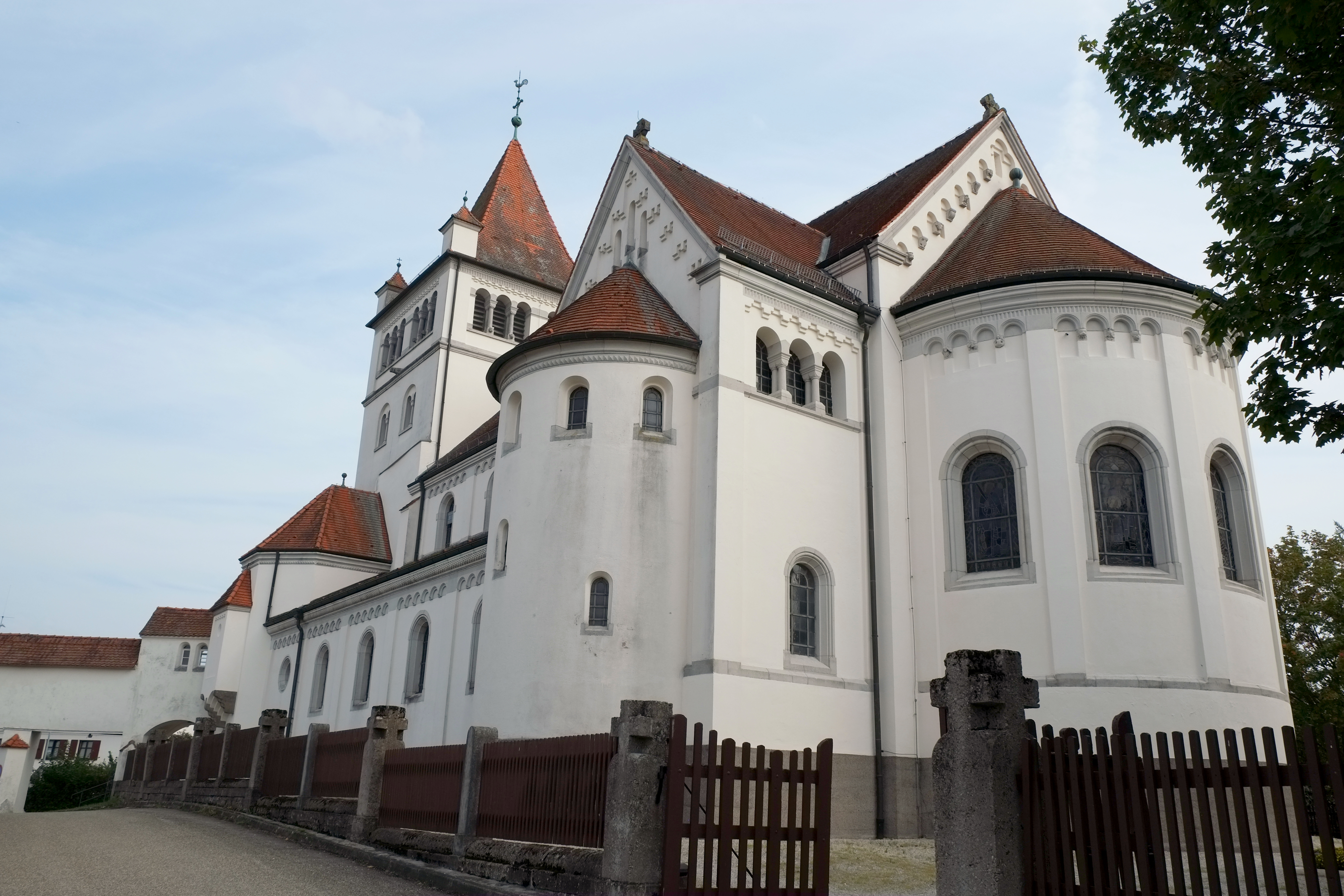 Katholische Pfarrkirche St. Gallus in Fremdingen im Landkreis Donau-Ries (Bayern, Deutschland)